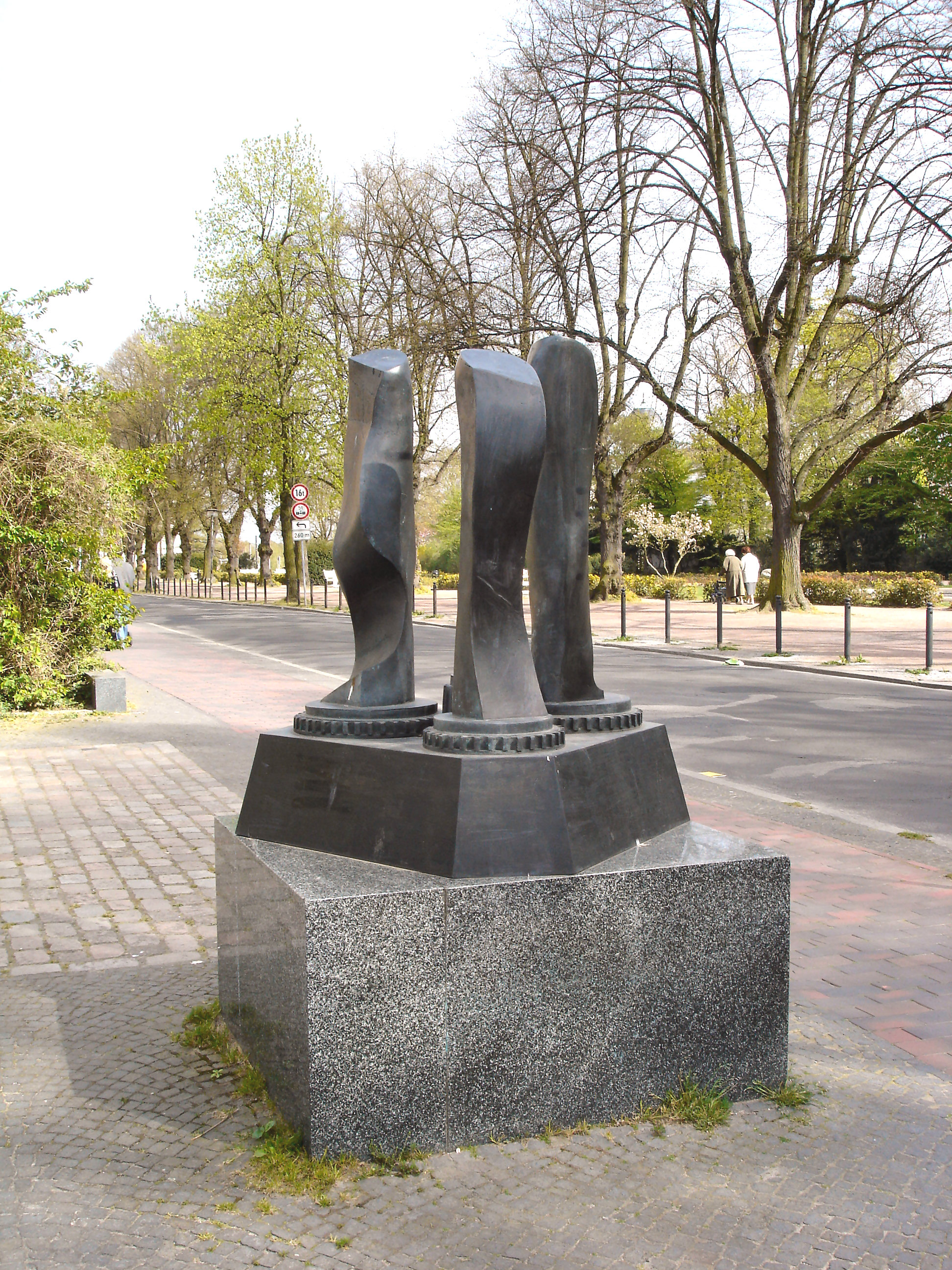 Skulptur "Hommage a Blücher" von Reinhard Buch in Rostock / Sculpture "Hommage a Blücher" of Reinhard Buch in Rostock